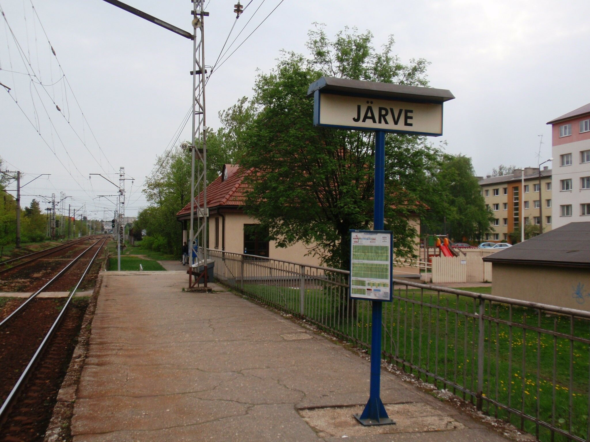 Järve rongipeatus Tallinnas.